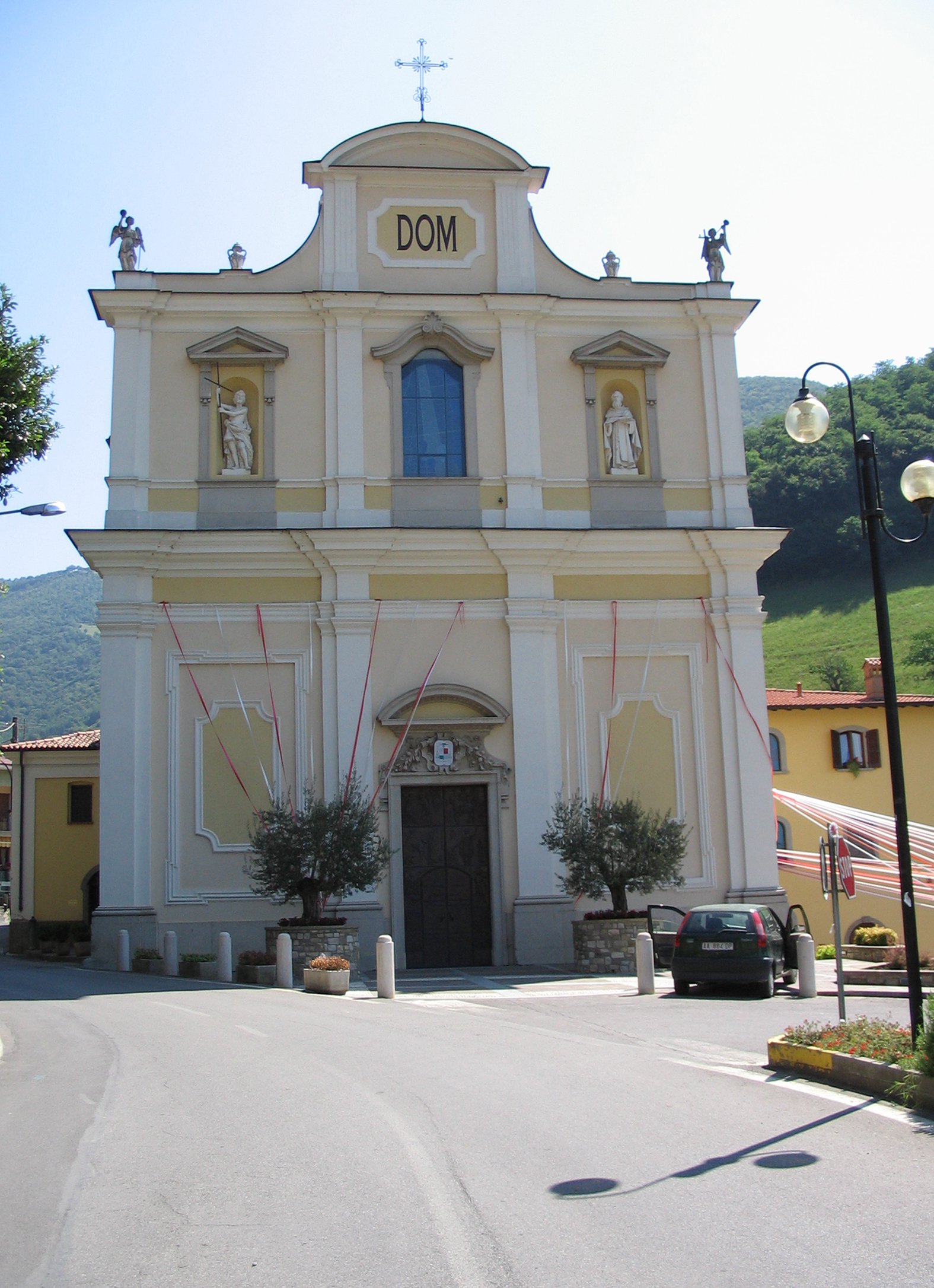 Autore Giorces.Viadanica, la Parrocchiale.